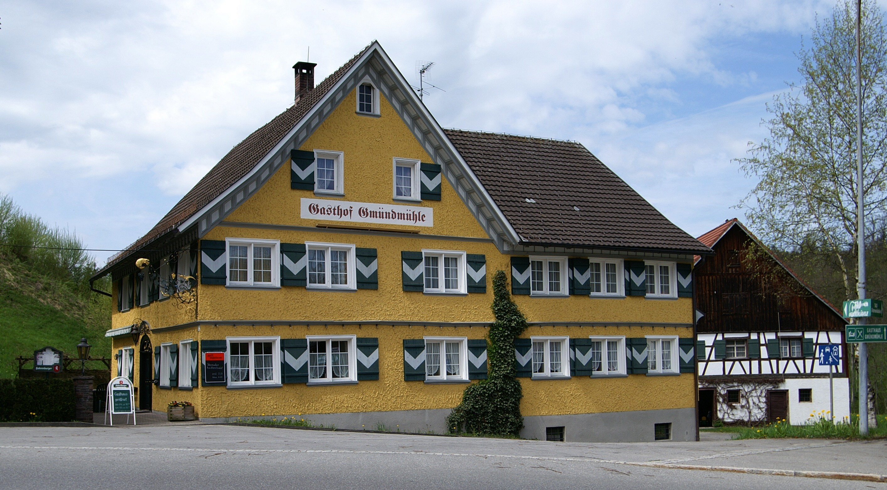 aus dem DEHIO Vorarlberg 1983: Hohenweiler, Gmundmühle mit Gasthaus Traube: Im Weiler Gmünd an der Staastgrenze, 2geschossiger Bau mit Giebelgeschoß und Kreuzgiebel, 2 Giebelfassaden mit Klebdächern, korbbogiges Portal mit klassizistischen Oberlichtgittern, bezeichnet 1815, schmiedeisener Ausleger 2. Hälfte 18. Jh. Rückseitig 2armige Freitreppe, darunter Kellerportal mit Steingewände, bezeichnet 1743. Daneben Wirtschaftsgebäude - Stall - Tenne - Schopf, Wohnteil in Fachwerk, traufseitiger Eingang im Obergeschoß, Tennentor mit Ochsenblutbemalung, Stadellukenbretter (Herzformausschnitte), gemauerte Ställe. *** in Vorarlberg